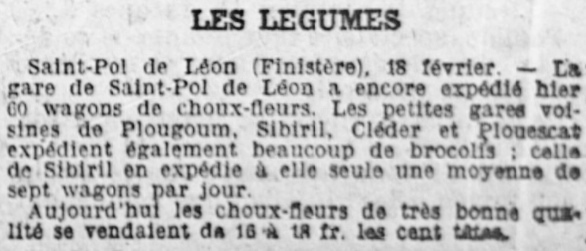 Article du journal L'Ouest-Eclair évoquant le transport des brocolis par la ligne des Chemins de fer départementaux du Finistère depuis les gares de Plouescat, Cléder, Sibiril et Plougoulm à destination de Saint-Pol-de-Léon.